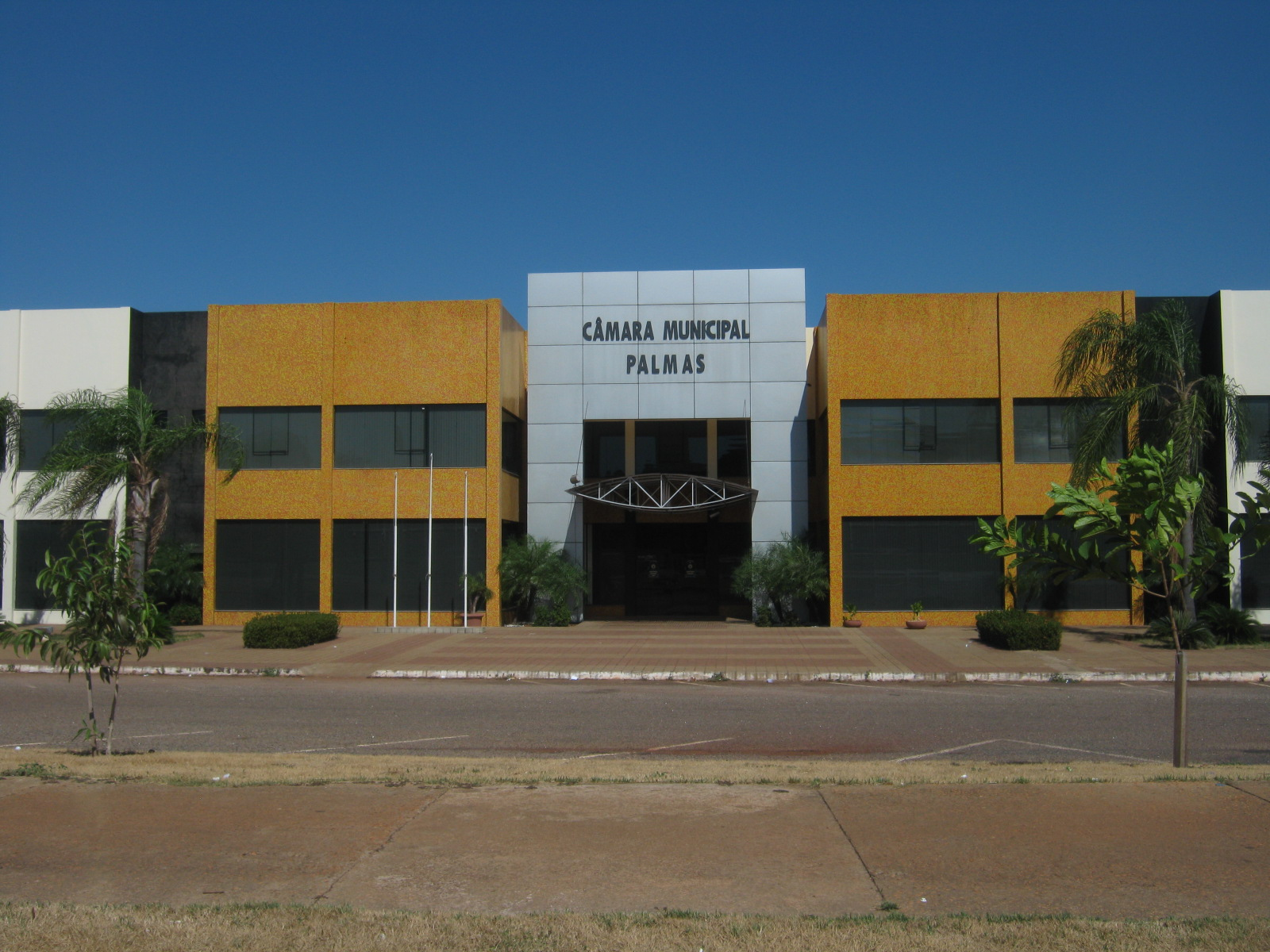 Câmara Municipal de Palmas, Tocantins, Brasil